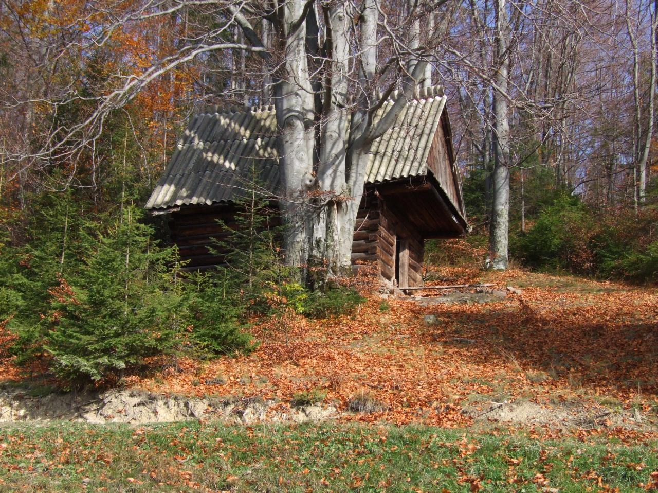 Polana Chowańcowa w Gorcach